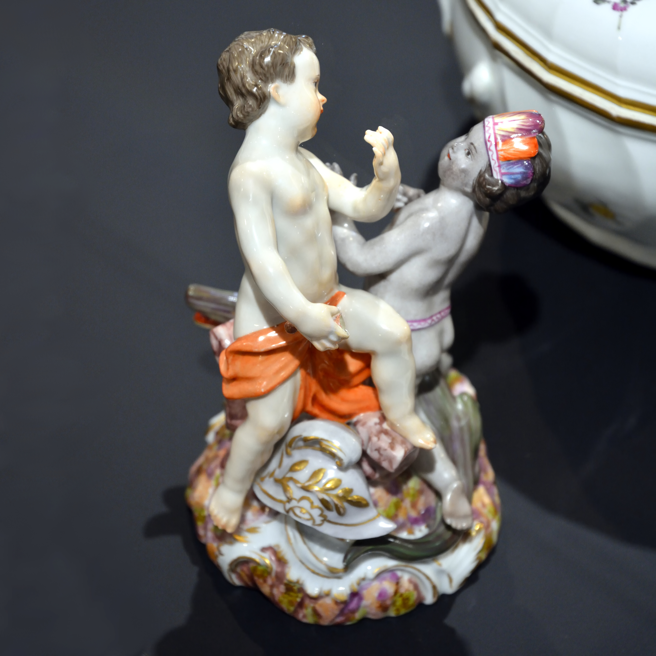 Impressionen vom Porzellanmuseum Schloss Fürstenberg Zwei Kindergruppen: "Die vier Theile der Welt" von Anton Carl Luplau